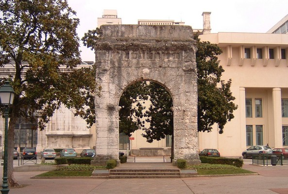 Arc funéraire romain de Campanus présent dans la ville d'Aix-les-Bains en Savoie. Cet arc fut dressé par, le patricien de la Gaule Narbonnaise, Lucius Pompeius Campanus afin d'honorer l'honneur des défunts de sa famille.